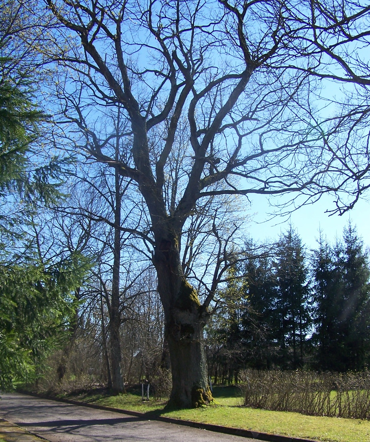 Alizavos ąžuolas